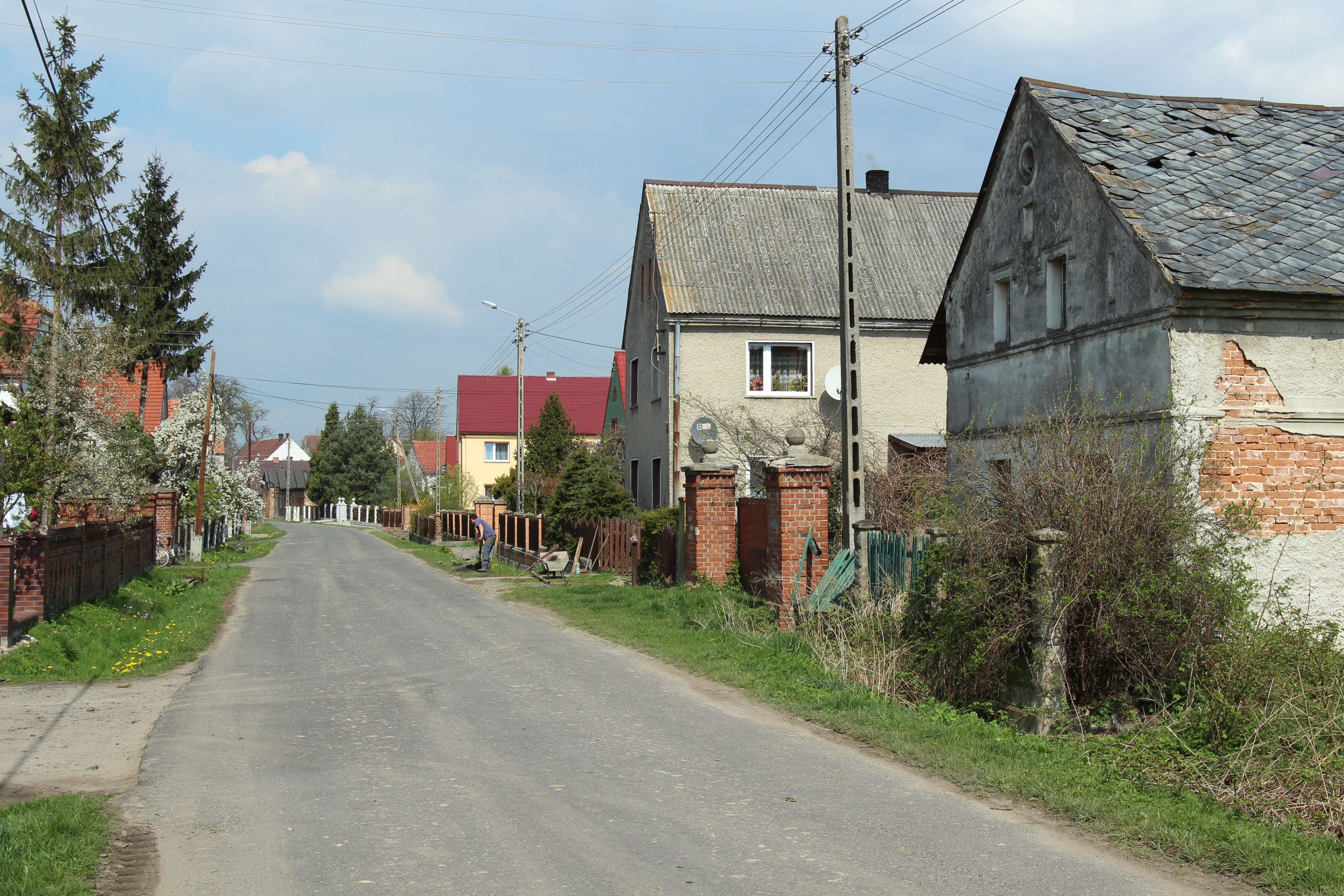 Myszowice – wieś w Polsce położona w województwie opolskim, w powiecie nyskim, w gminie Korfantów.